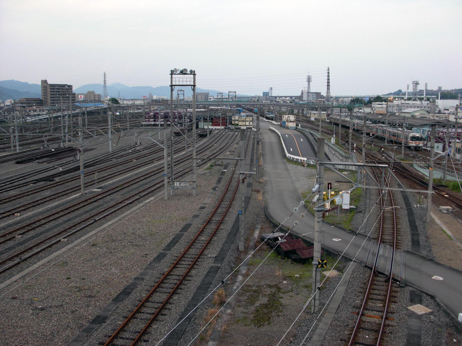 静岡市駿河区池田、JR貨物 静岡貨物駅構内（長沼大橋から上り草薙駅方面を望む）。下り着発荷役線に、貨物列車が停車中。